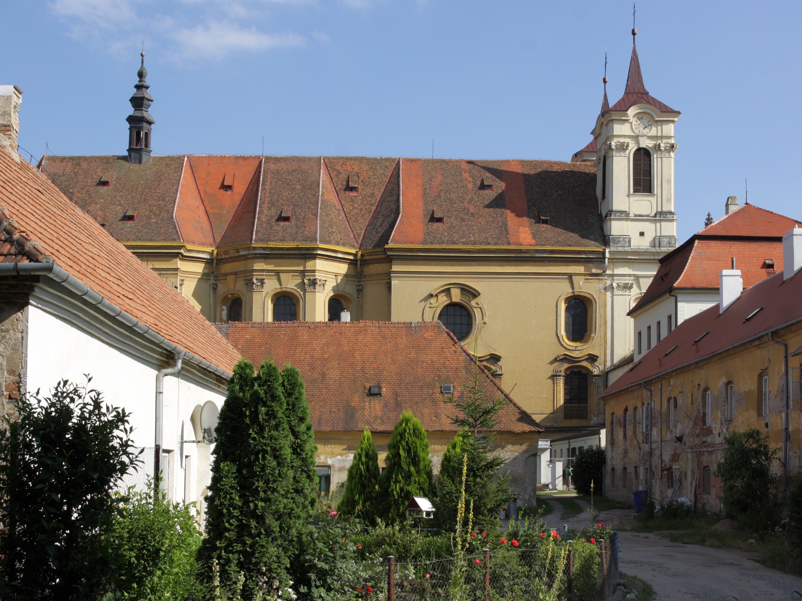 Rajhrad - Kostel svatého Petra a Pavla.